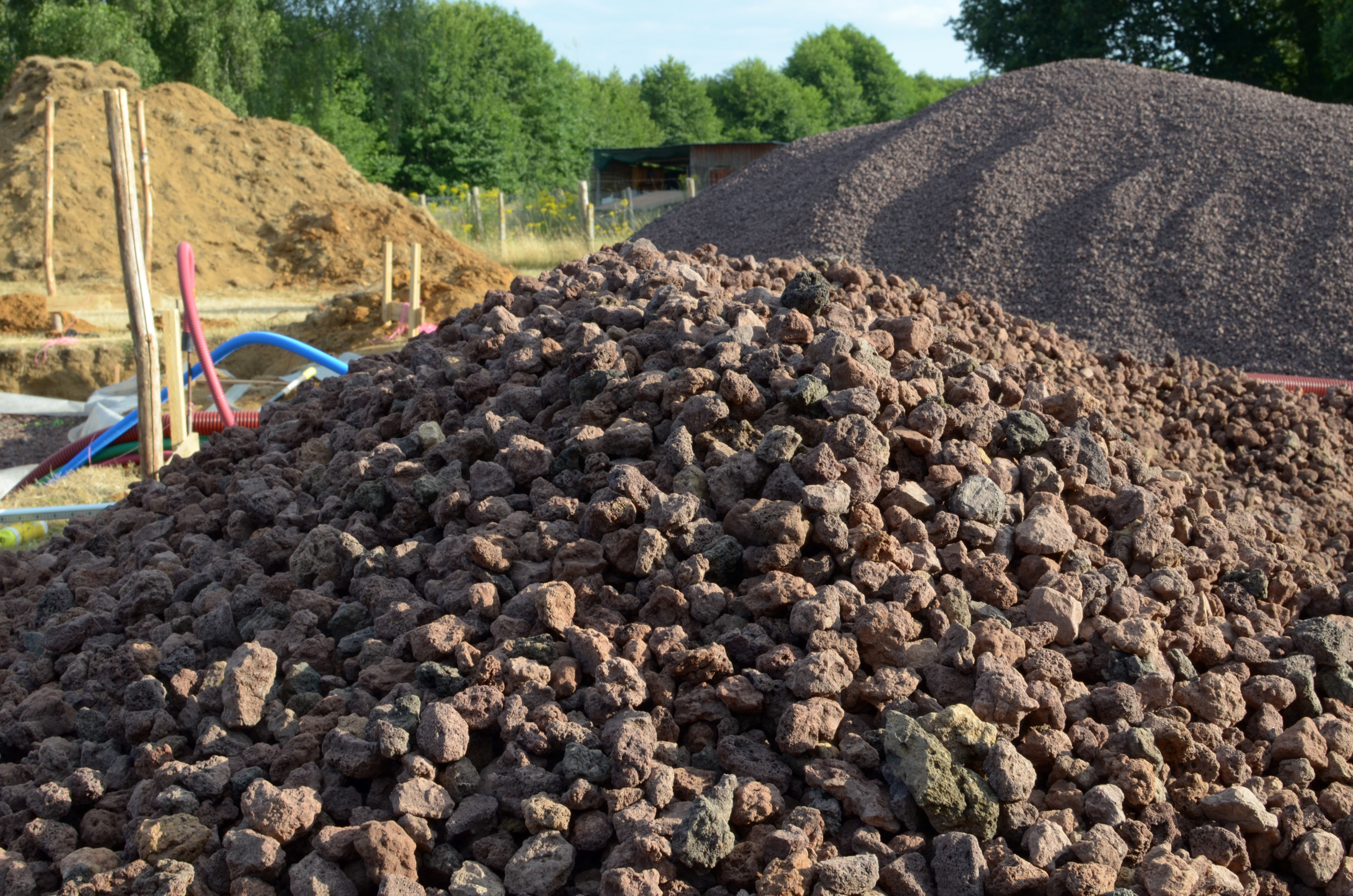 tas de pouzzolane